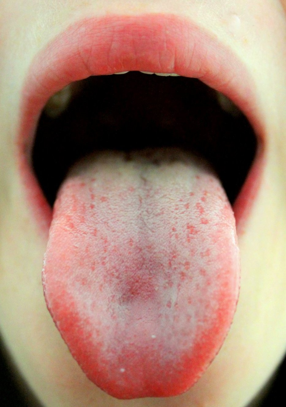 לשון